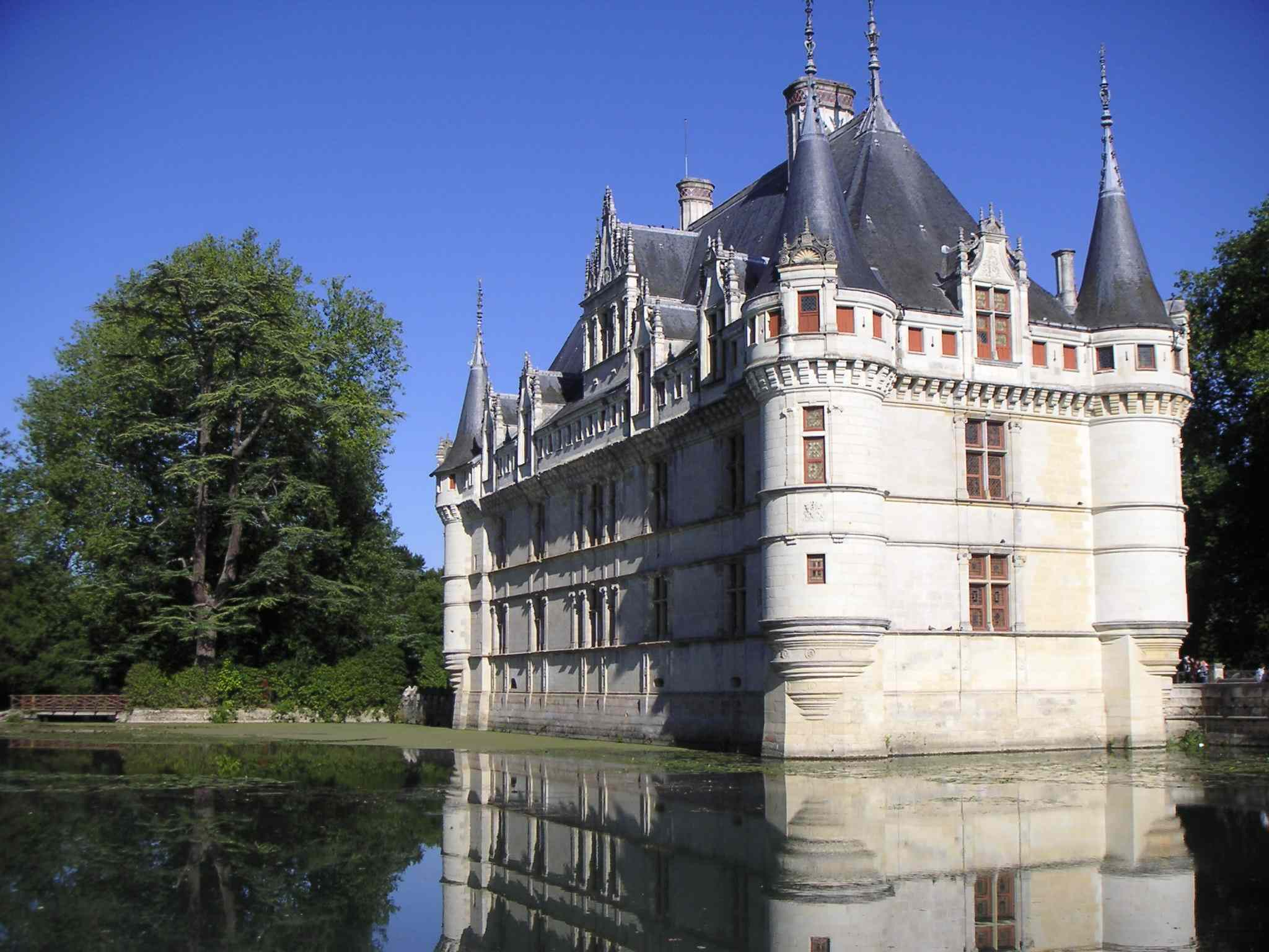 Vue du château d'Azay-le-rideau, prise par mes soins.